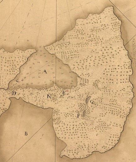 Península de Valdés, según Villarino (1779), explorador español. Leyenda del mapa original: A. Puerto de San José. B. Puerto Nuevo. C. El mayor surgidero. D. Angostura de tierra entre Puerto Nuevo y San José. E. Campamento y pozos. F. Fuentes y salina N. Lagunas. G. Otra salina